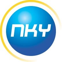 logo.jpglogo.jpg